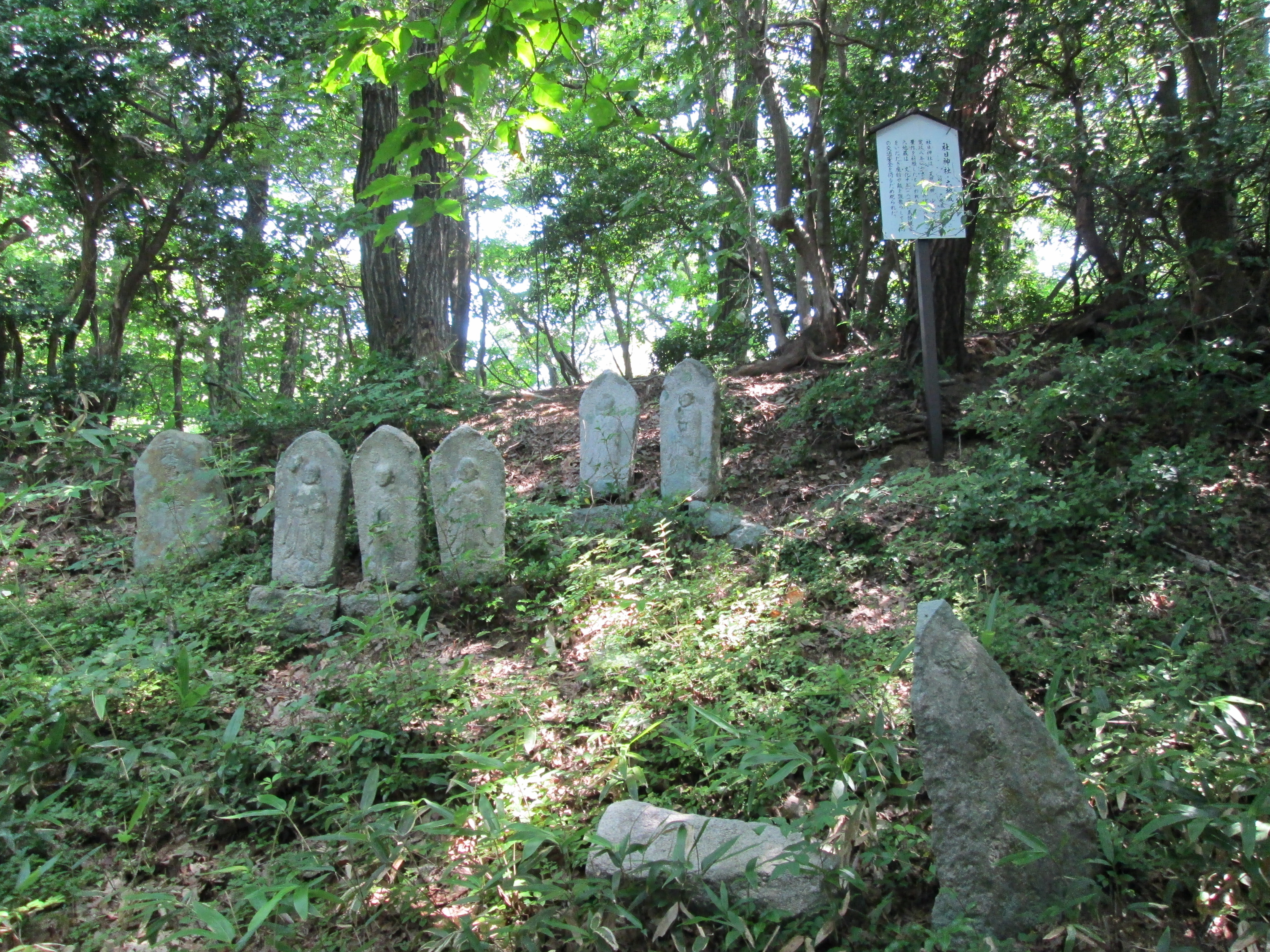 布部山の合戦時、この付近に尼子再興軍が本陣を敷いたと伝わる。